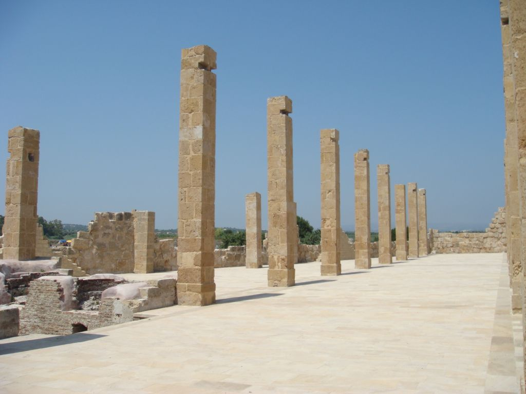 Rovine della tonnara di Vendicari, nell'Oasi naturale, nei pressi di Siracuasa.